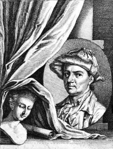 Portrait des Schweizer Malers Jakob Emanuel Handmann.